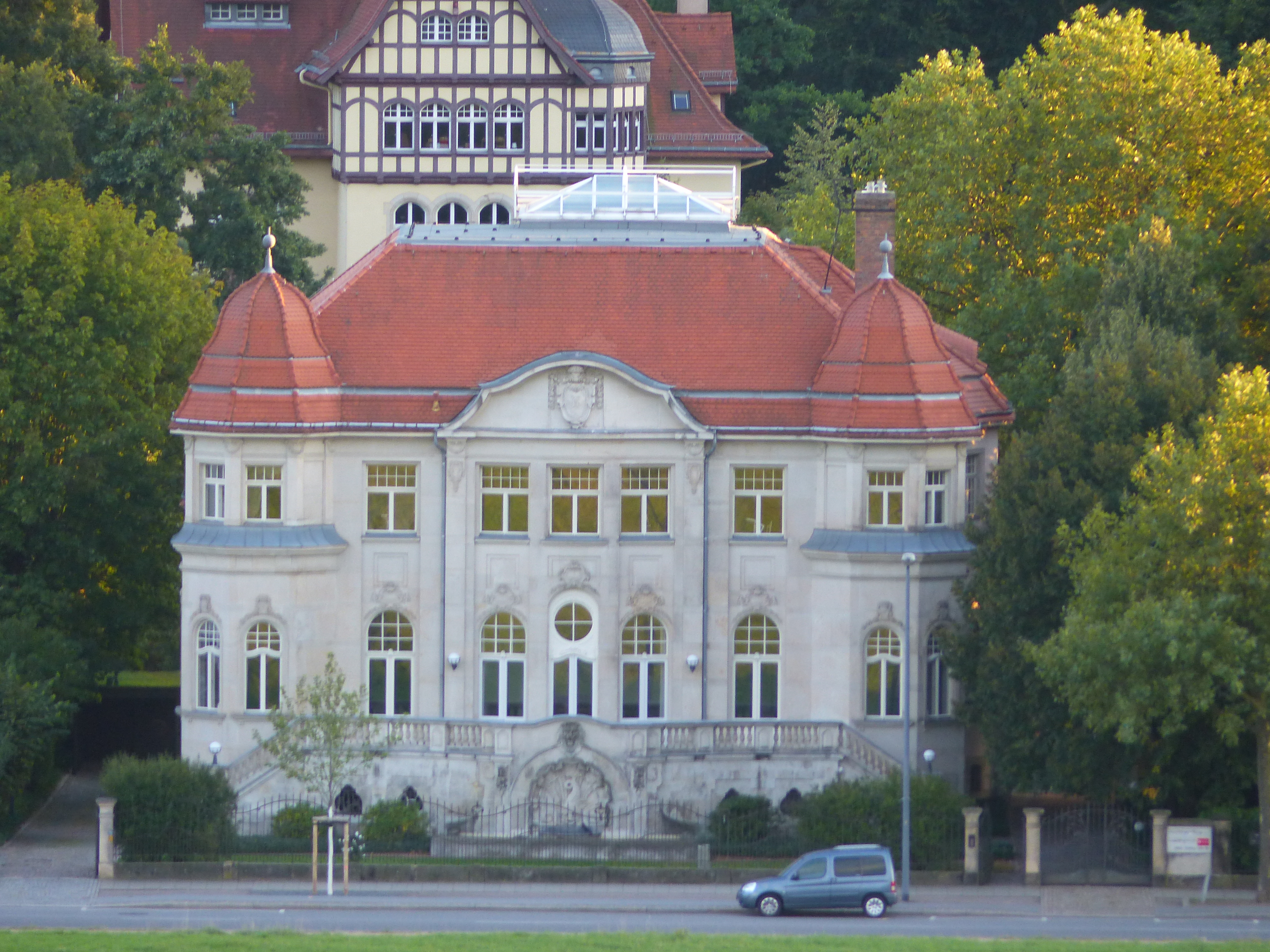 Denkmalgeschützte Villa, Käthe-Kollwitz-Ufer 88, Dresden, Sachsen